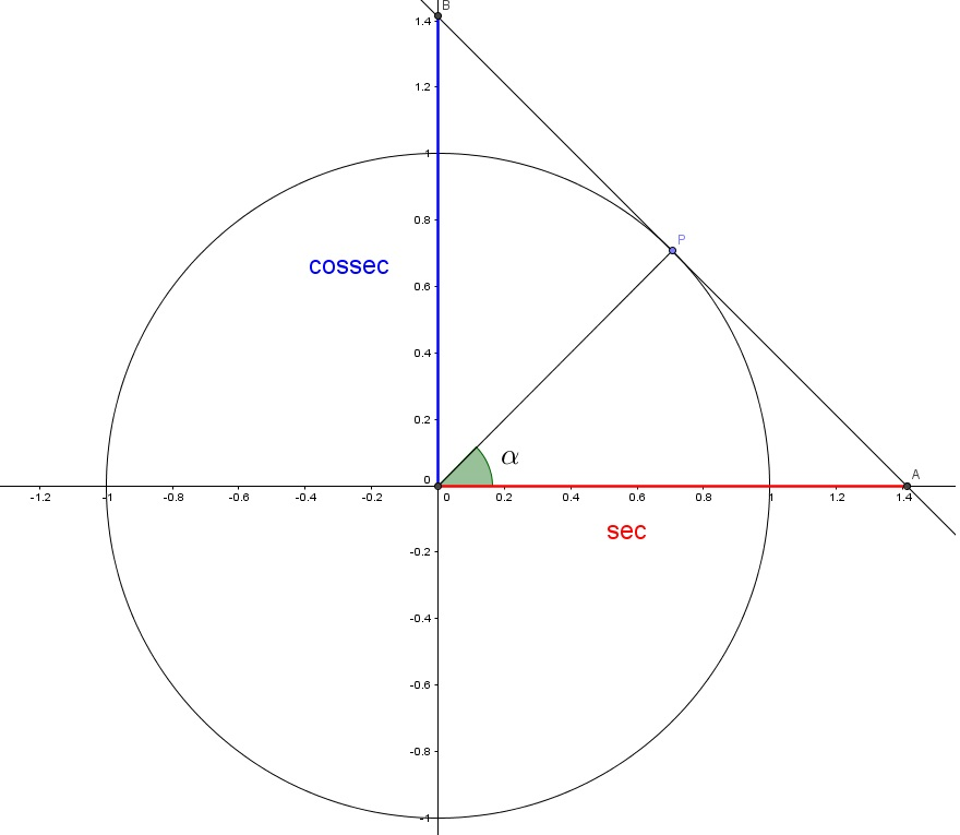 Relação entre Secante e Cossecante no Círculo Trigonométrico de raio unitário